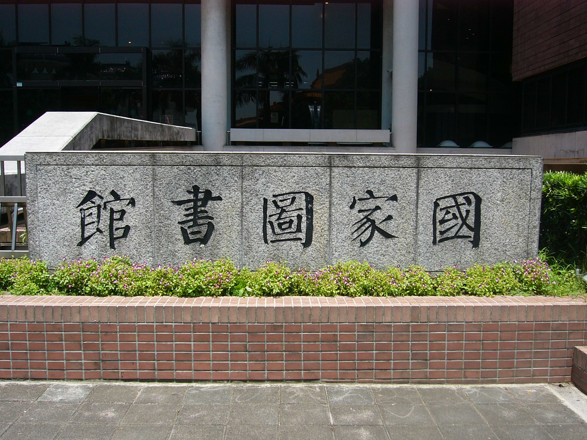 中華民國國家圖書館總館大門前階梯右側的中文館名石碑。